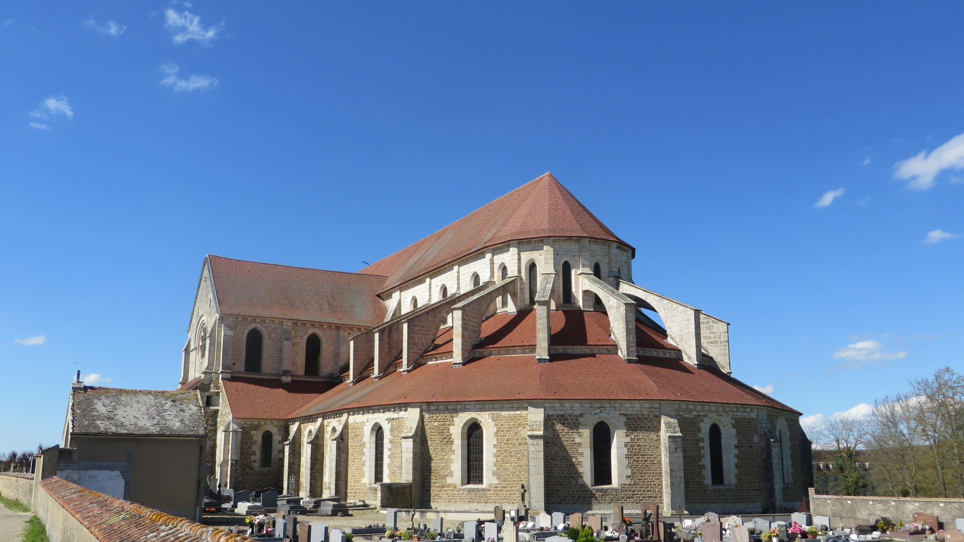 Oostzijde van de abdij